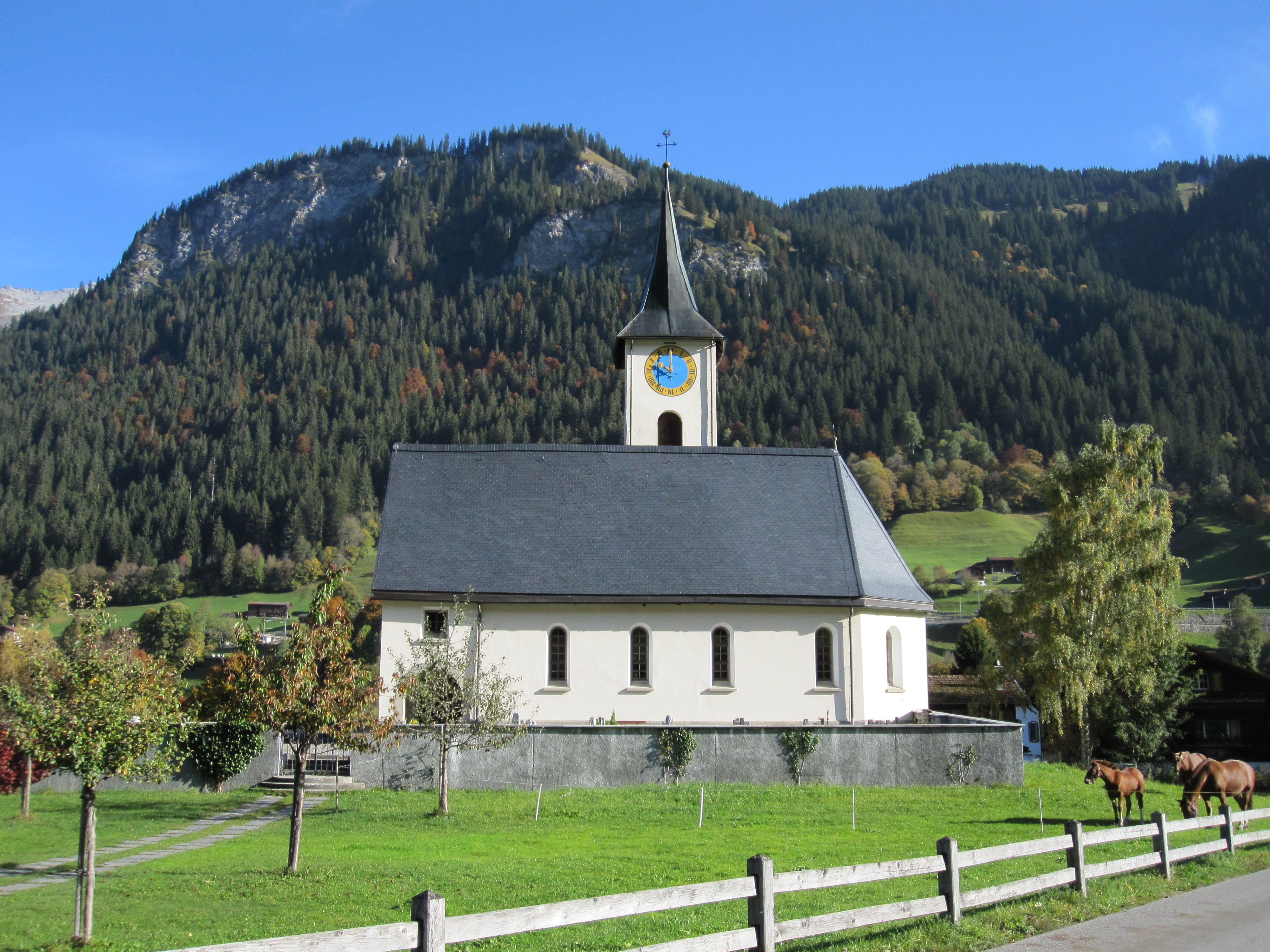 reformierte Kirche Serneus (Kanton Graubünden)